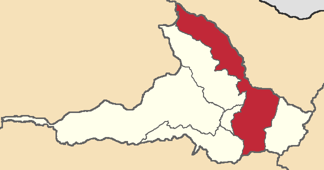 Mapa localizacor del cantón Ibarra, Imbabura, Ecuador